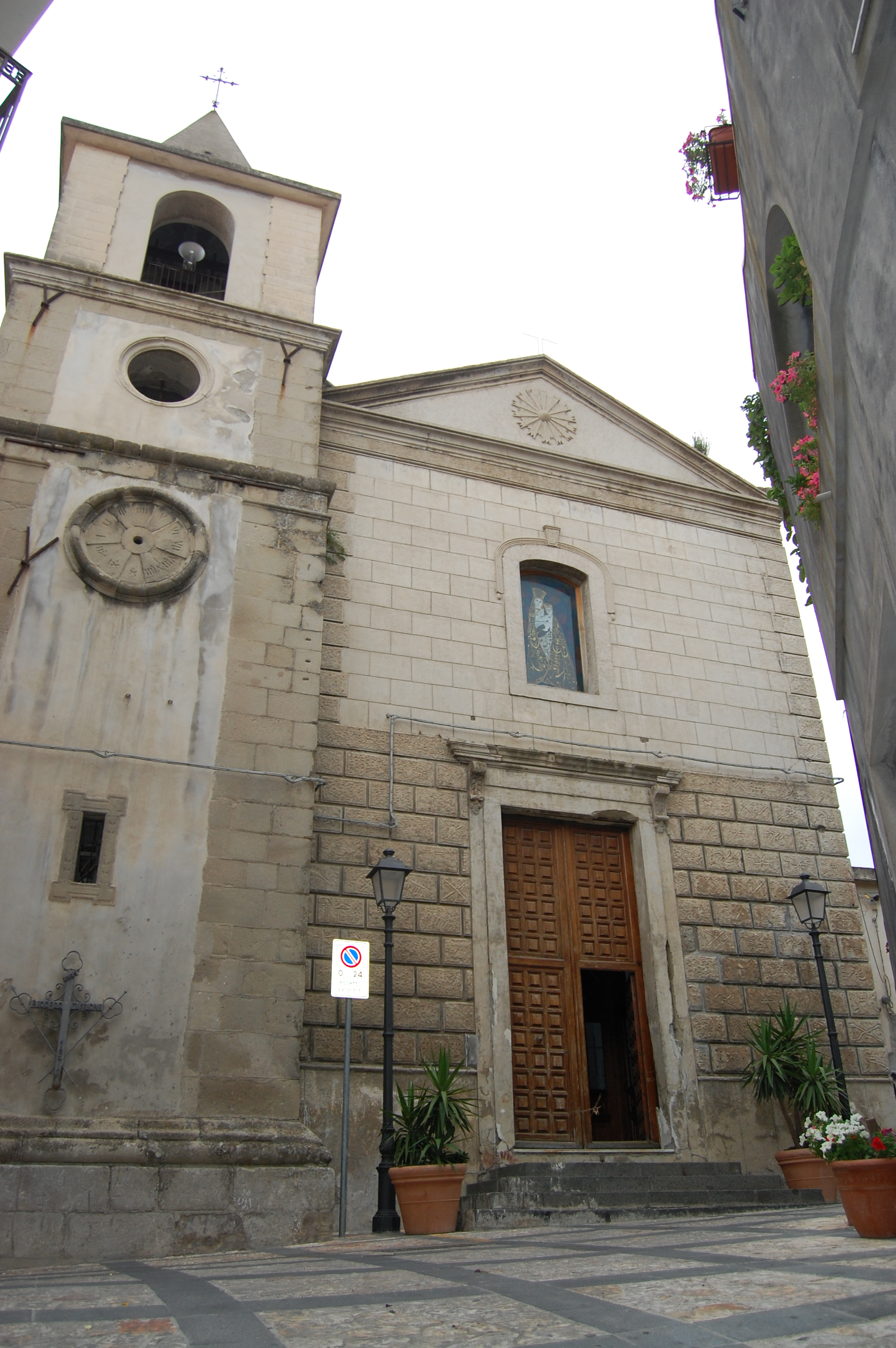 La chiesa di San Michele Arcangelo, comune di Motta Camastra, provincia di Messina, Sicilia.